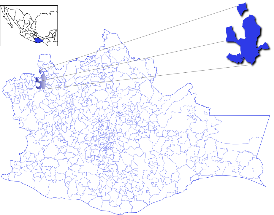 Mapa del municipio de Huajuapan de Leòn, Oaxaca, Mèxico.